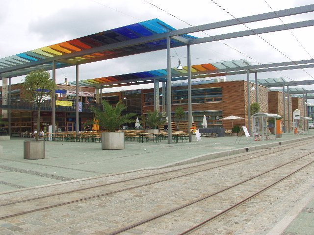 solarCity Linz Ortsplatz